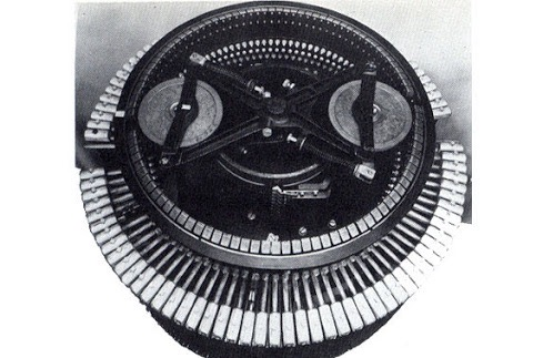 WHのPCCカー用加速器